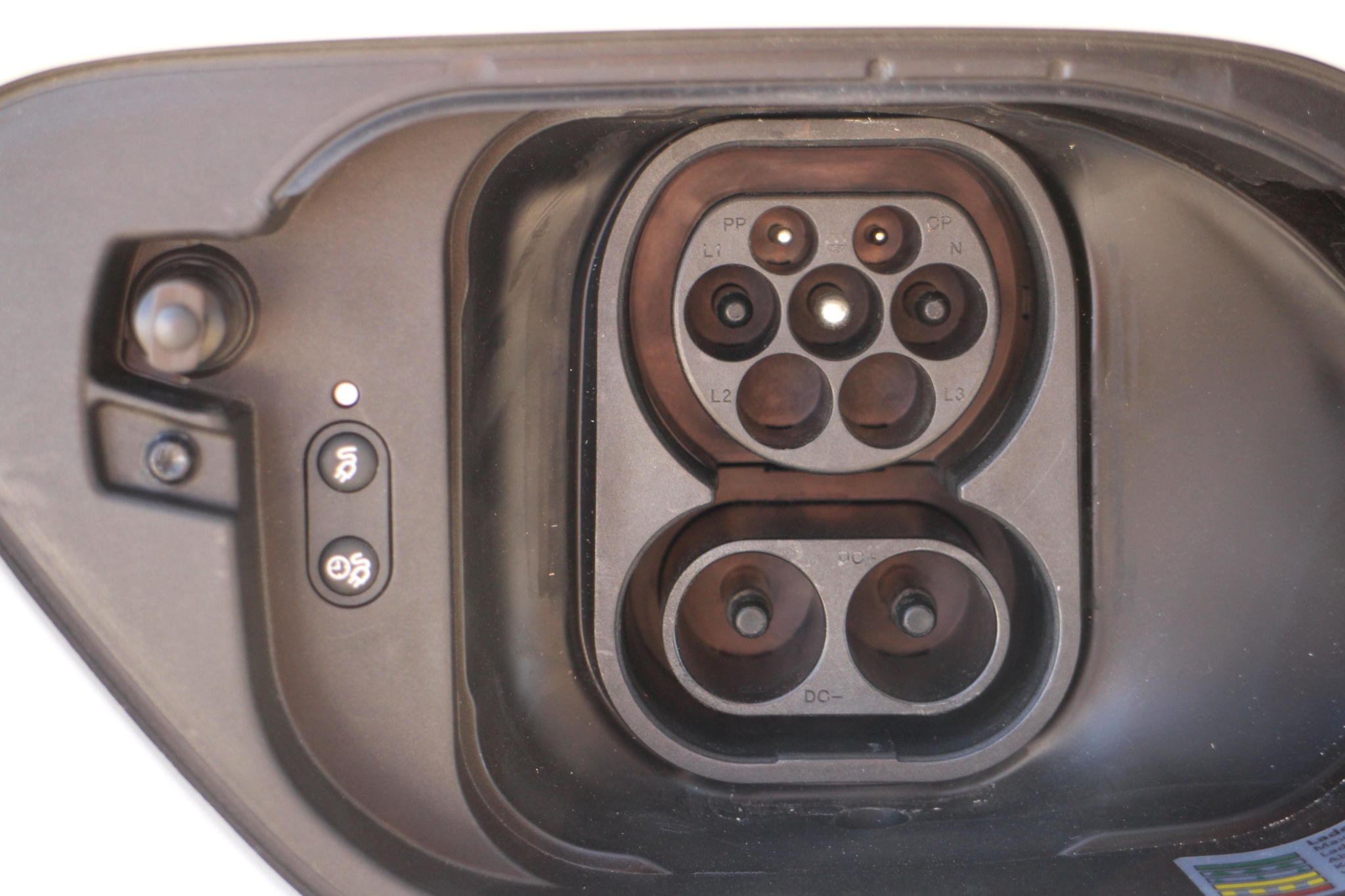 der neue, rein elektrisch angetriebene eGolf (auf Basis des Golf 7) Reichweite 130-190 km 3 Fahrmodi = Eco und Eco+, Normal 24 kWh Batterie Gewicht 318 kg 12,7 kWh/100 km Batterieposition: über Hinterachse Ladedauer: 20% auf 80% in ca. 30 Minuten beim Schnelllader und 3-4 Stunden bei Haushaltssteckdose 115 PS / 270 Nm Höchstgeschwindigkeit 140 km/h Kofferraumvolumen 341 -- 1.231 Liter Preis: ab 35.000 Euro